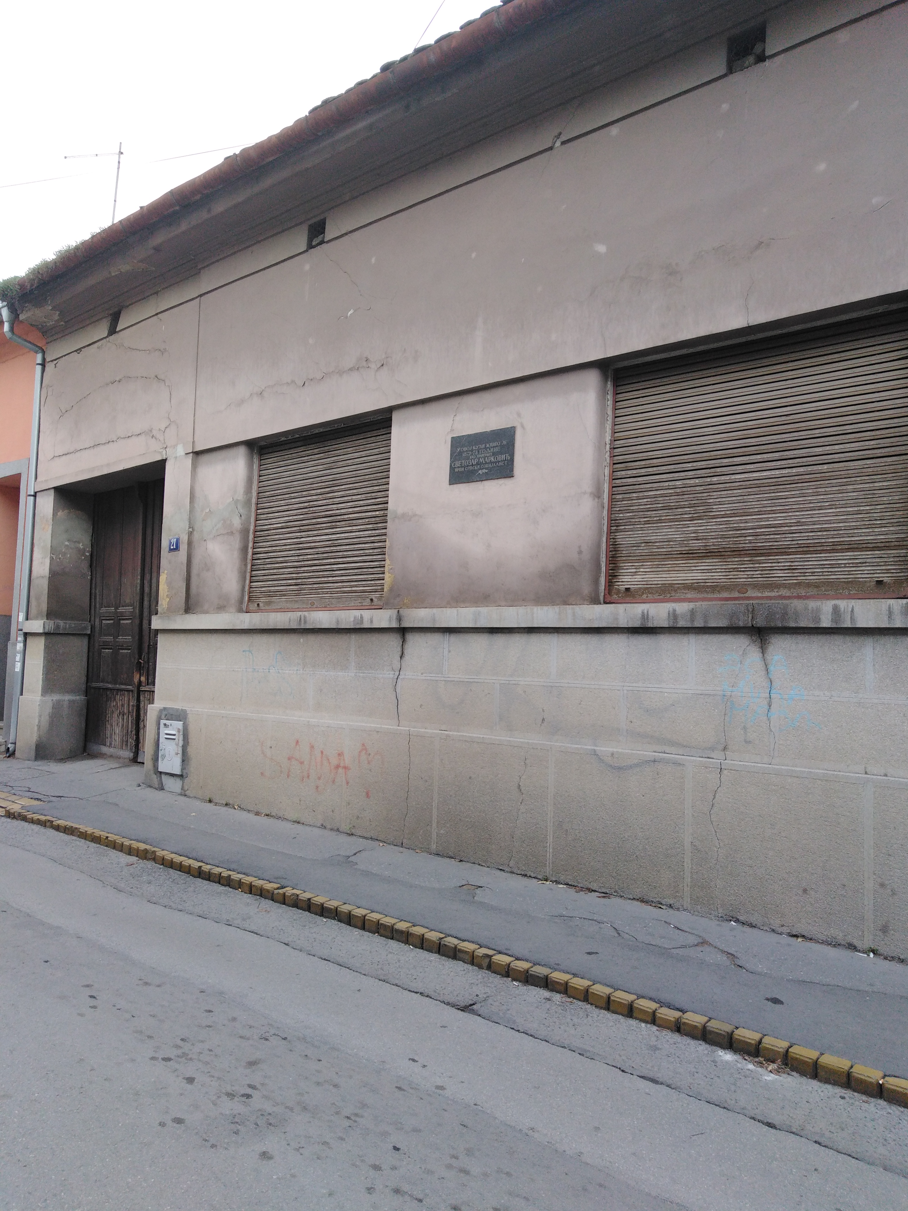 Кућа новосадског трговца у којој је становао Светозар Марковић током изгнанства у Новом Саду, улица Златне греде бр. 21